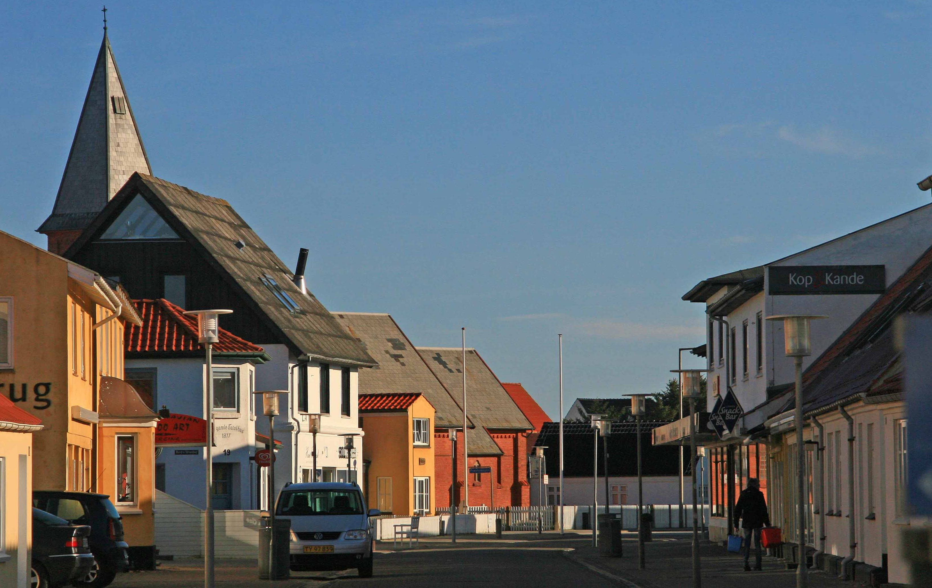 løkken small Danish town